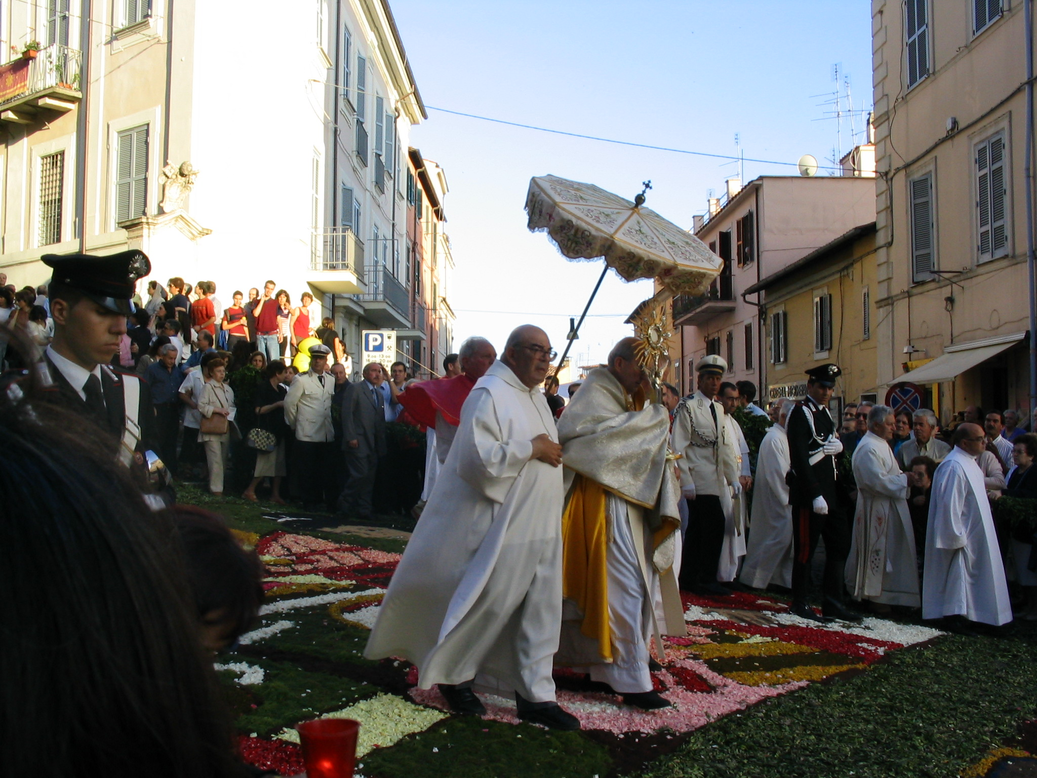 Genzano di Roma, Infiorata, Processione